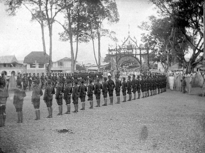 Negatief. Bezoek van de gouverneur-generaal aan Fort de Kock, Sumatra